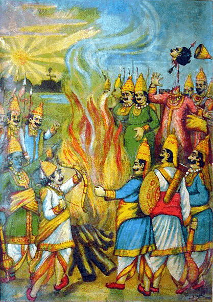 Arjuna Kills Jayadrath